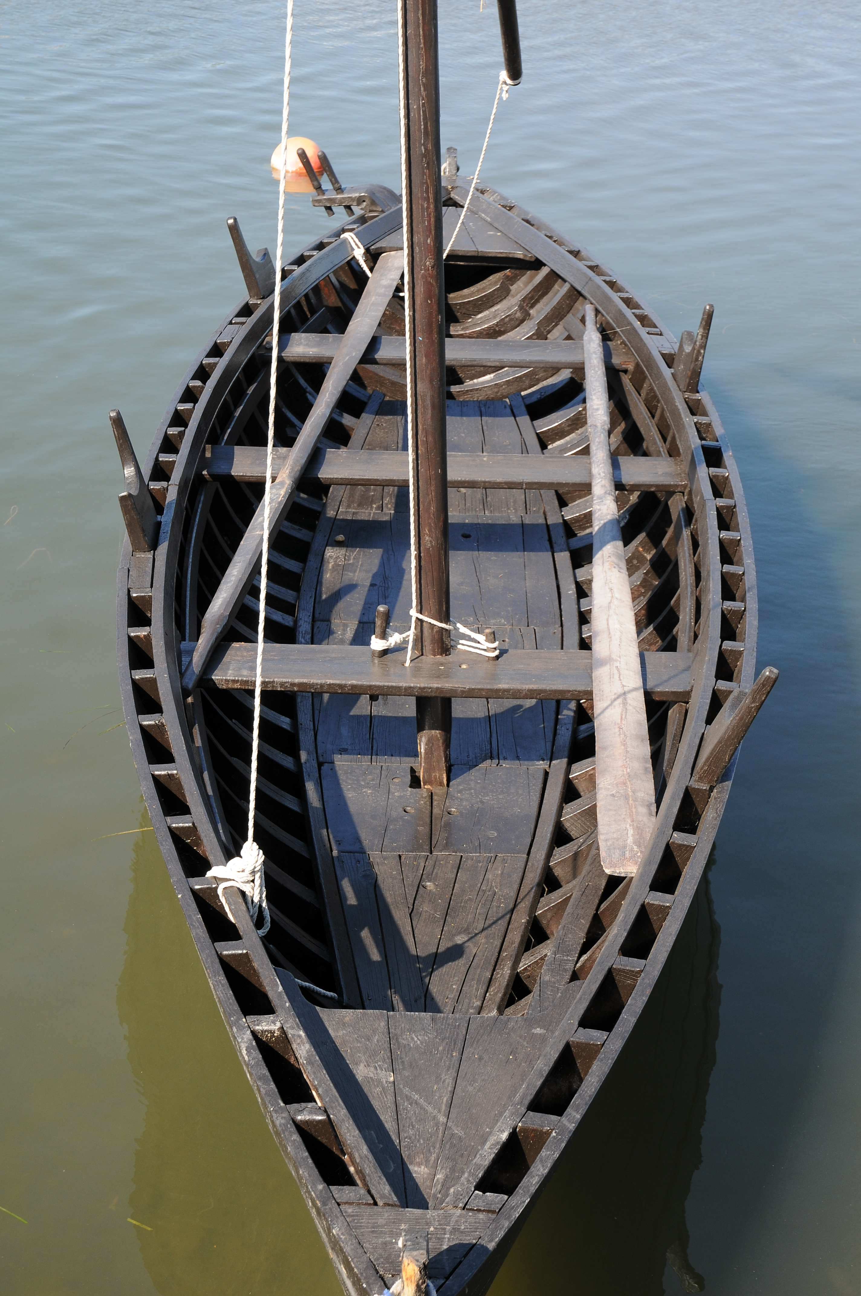 Fischerboote vor Nin.